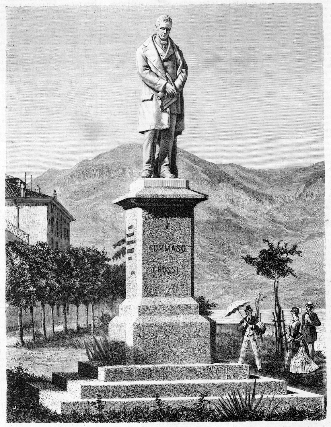 Monumento a Tommaso Grossi a Bellano inaugurato il 10 settembre 1876